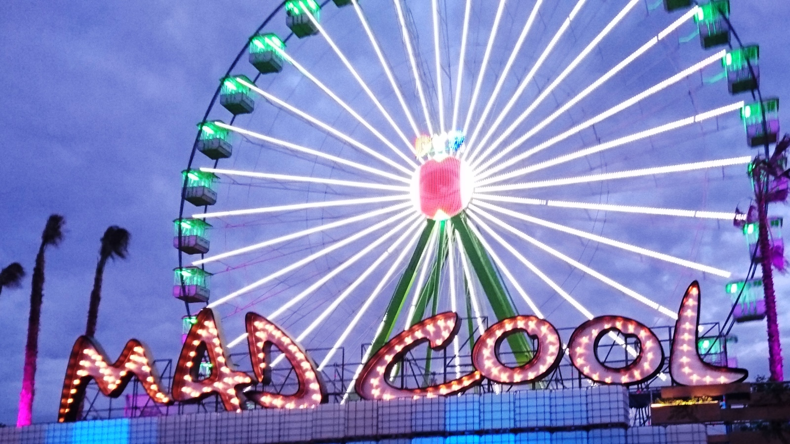 Noria instalada en el recinto de Mad Cool 2016 con el logo del festival iluminado.